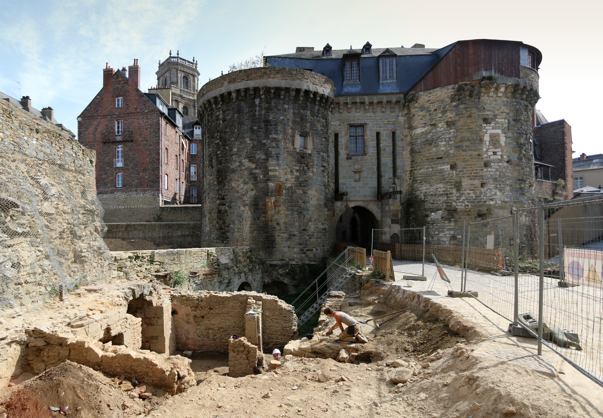 Porte mordelaise et la fouille archéologiques. .